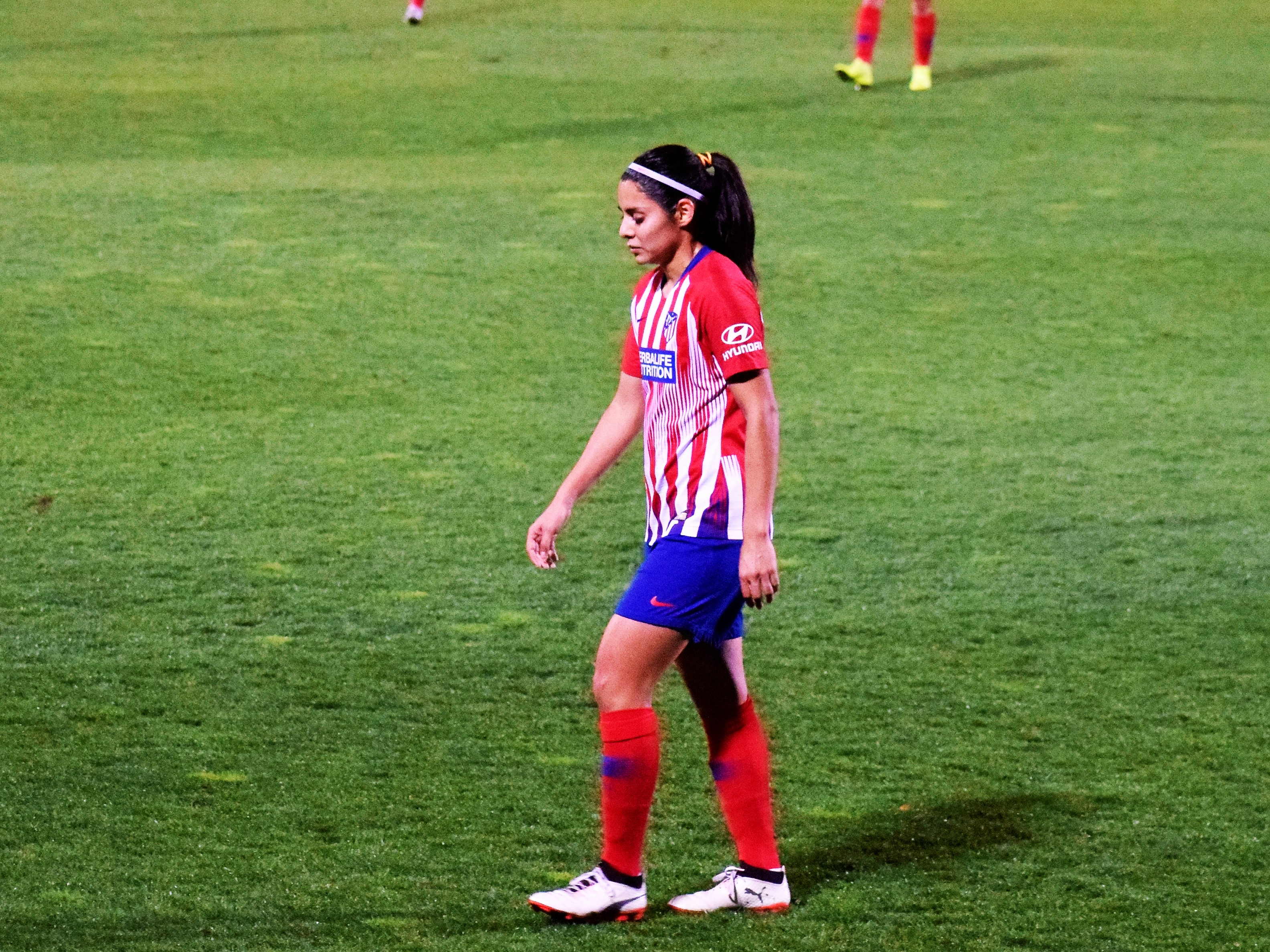 Kenti Robles jugando con el Atlético de Madrid